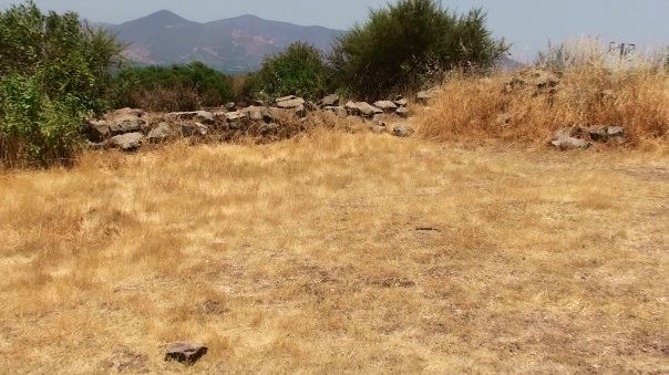 Centro religioso Inca en el valle del Maipo This is a photo of a national monument in Chile: 809